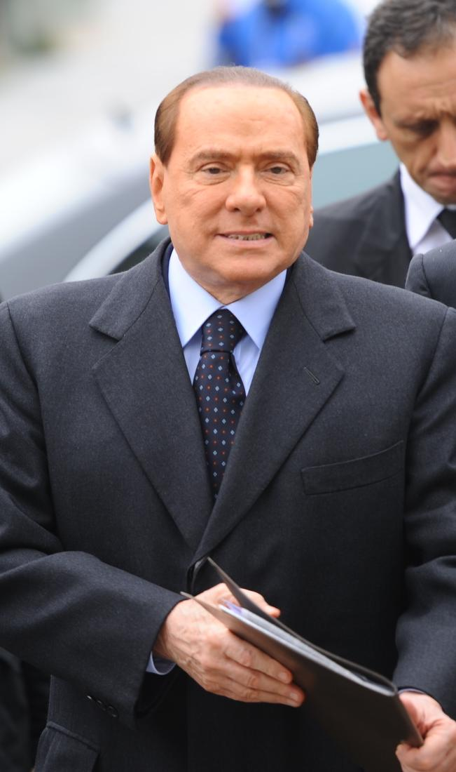 Berlusconi